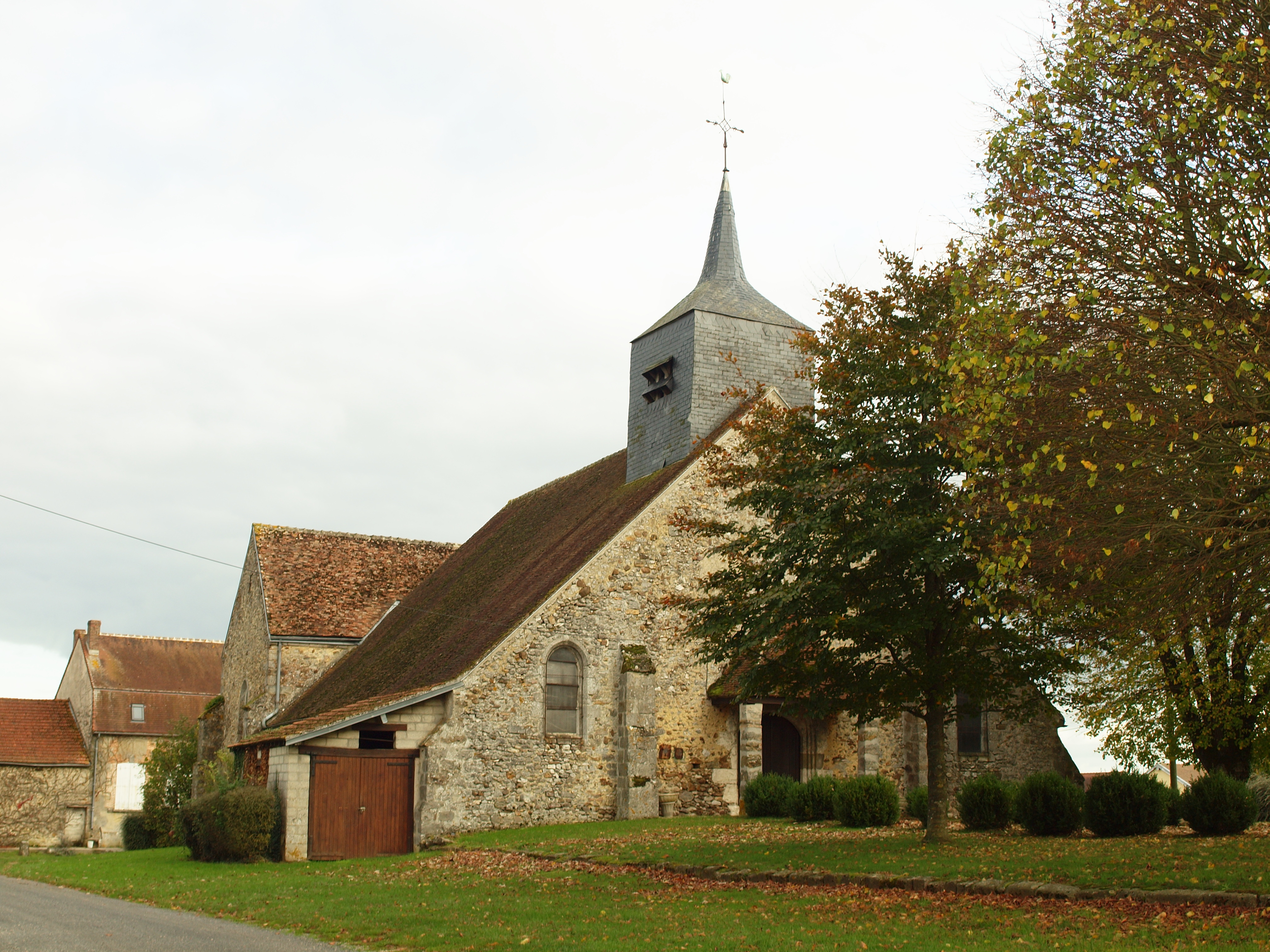 Église Saint-Antoine d'Escardes (Marne, France)